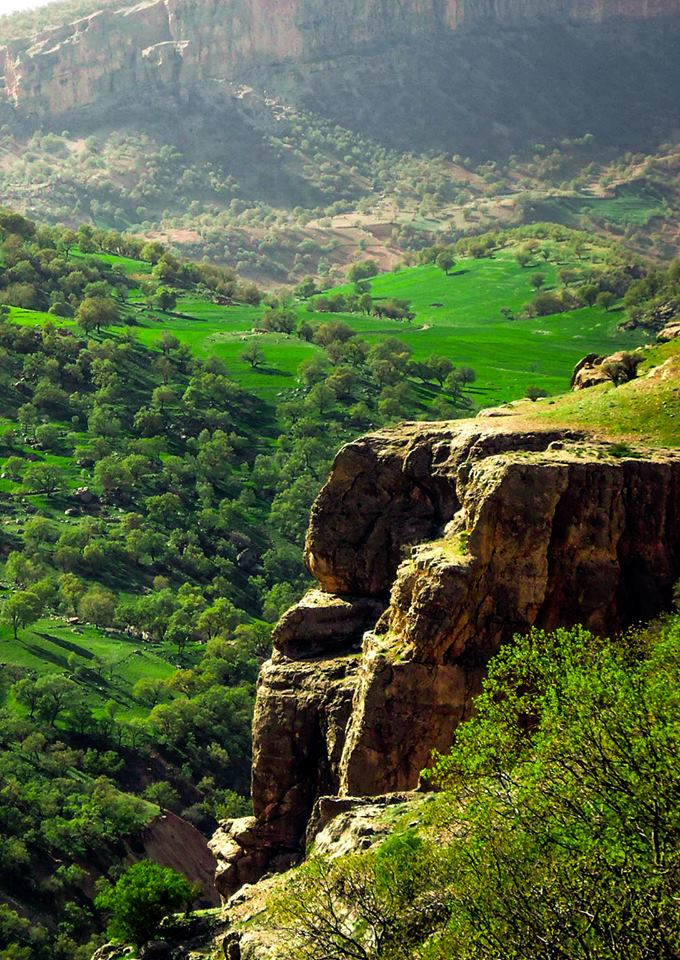 روستای پراشکفت در فروردین. این روستا در ۴۵ کیلومتری شهر یاسوج است.